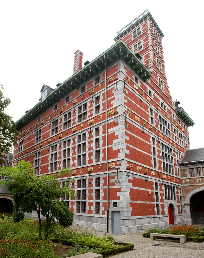 Hôtel, tegenwoordig Museum Curtius, Luik